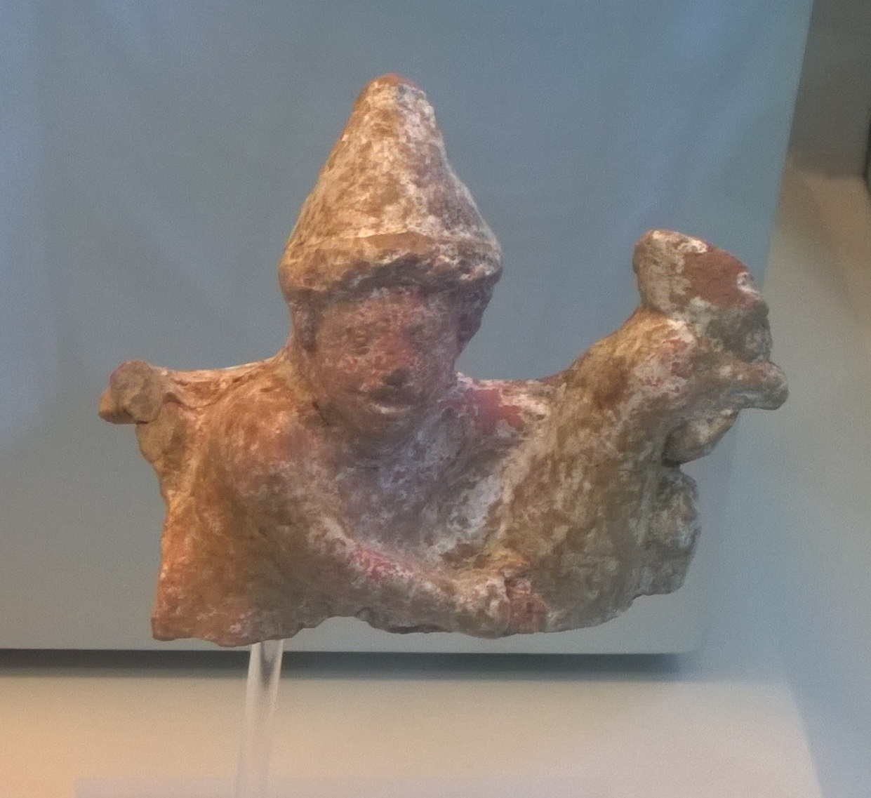 Terracotta figurine of a youth with a cockerel, Boeotian workshop from Chaeroneia